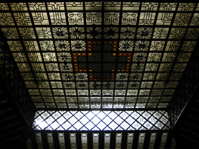 Vista interior del Parlament de Catalunya